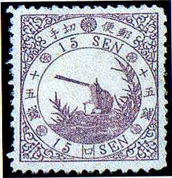 1875年に発行された15銭切手。この切手は国際郵便用の高額切手で、描かれているのはセキレイである。